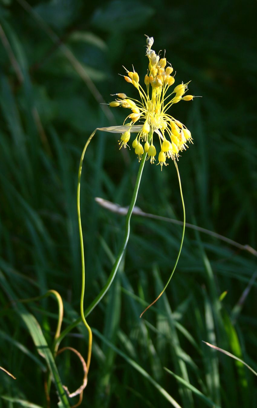 Gelb-Lauch (Allium flavum), Lauchgewächse (Alliaceae) - Österreich/Austria/Autriche: Niederösterreich, Alpenostrand, Glaslauterriegel ca. 1.7 km SW Gumpoldskirchen